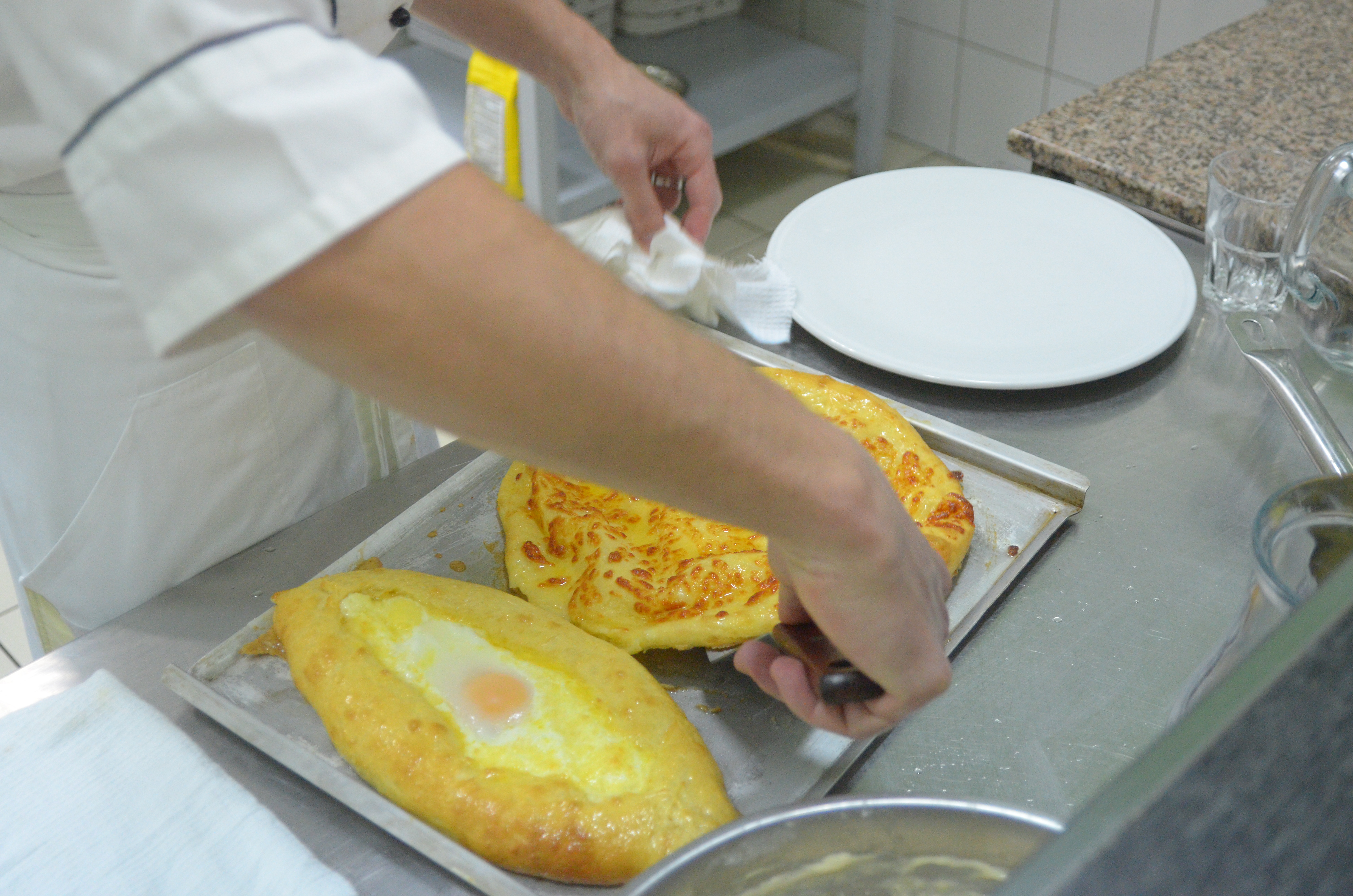 Ресторан «Ньютон» в Донецке.